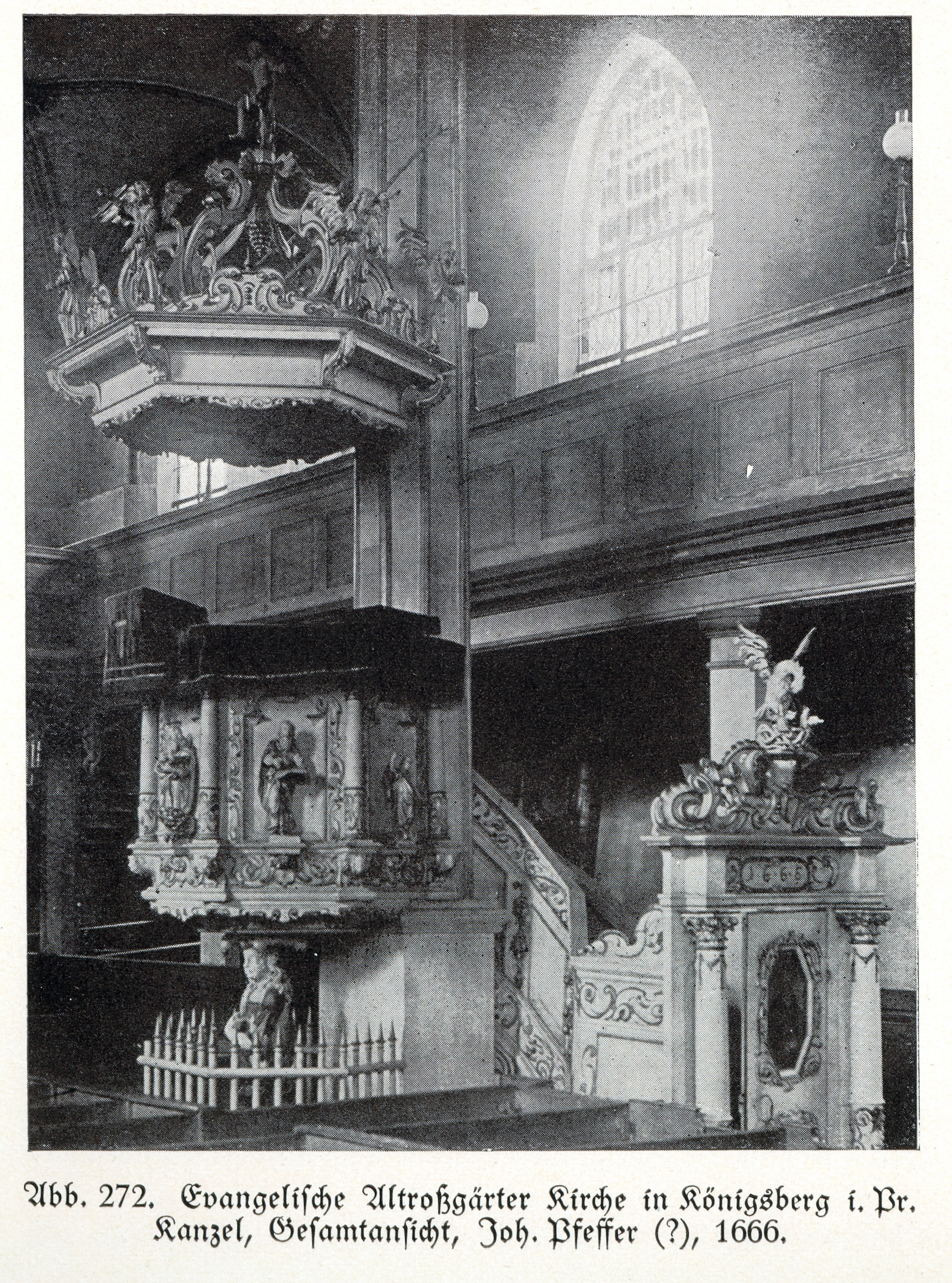 Königsberg, Evangelische Altroßgärter Kirche, Kanzel Joh. Pfeffer (?), 1666, Gesamtansicht